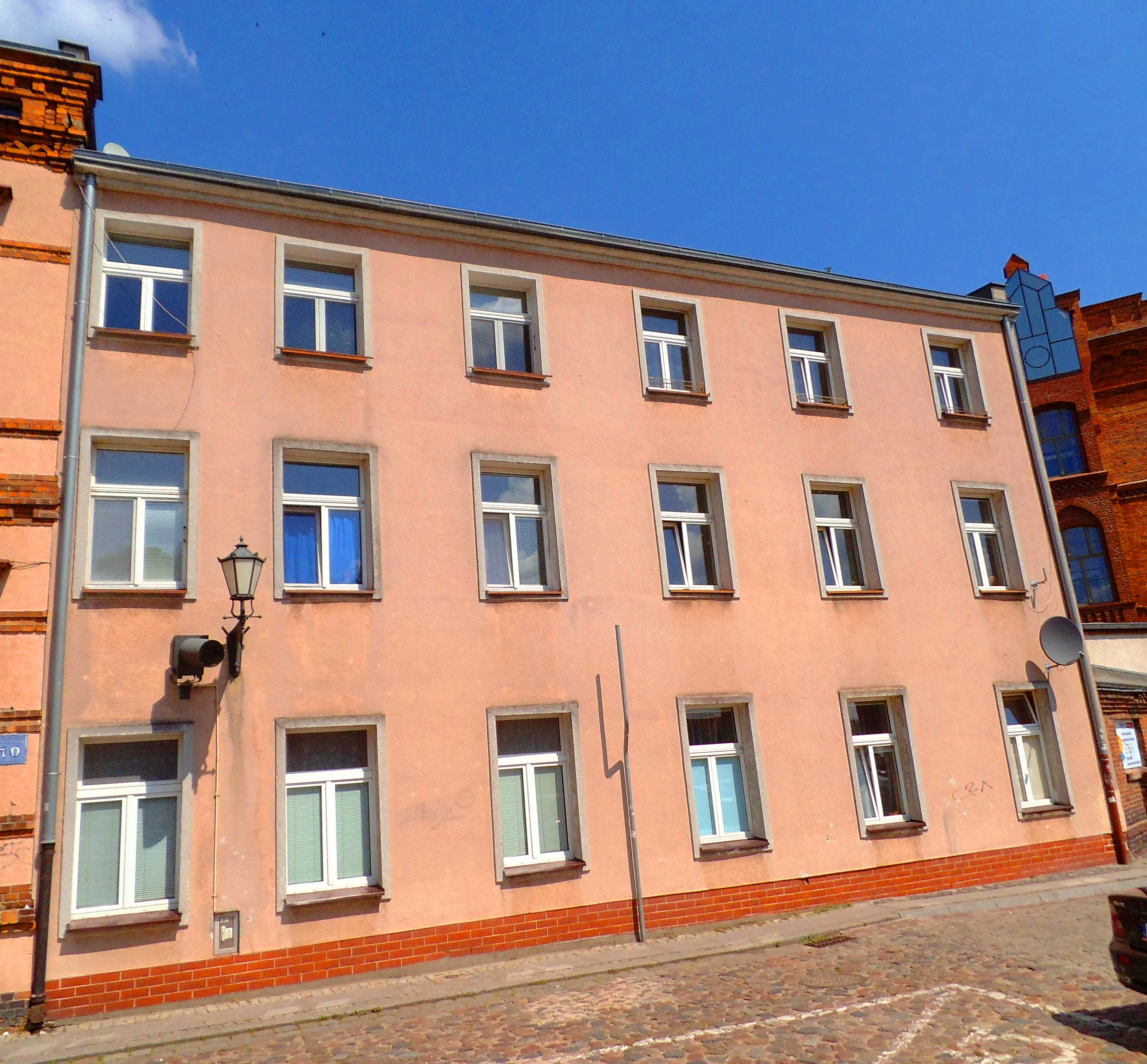 Dawny Szpital Miejskie w Toruniu